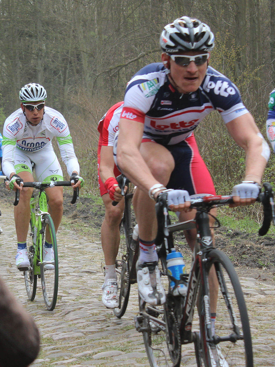 Andre Greipel